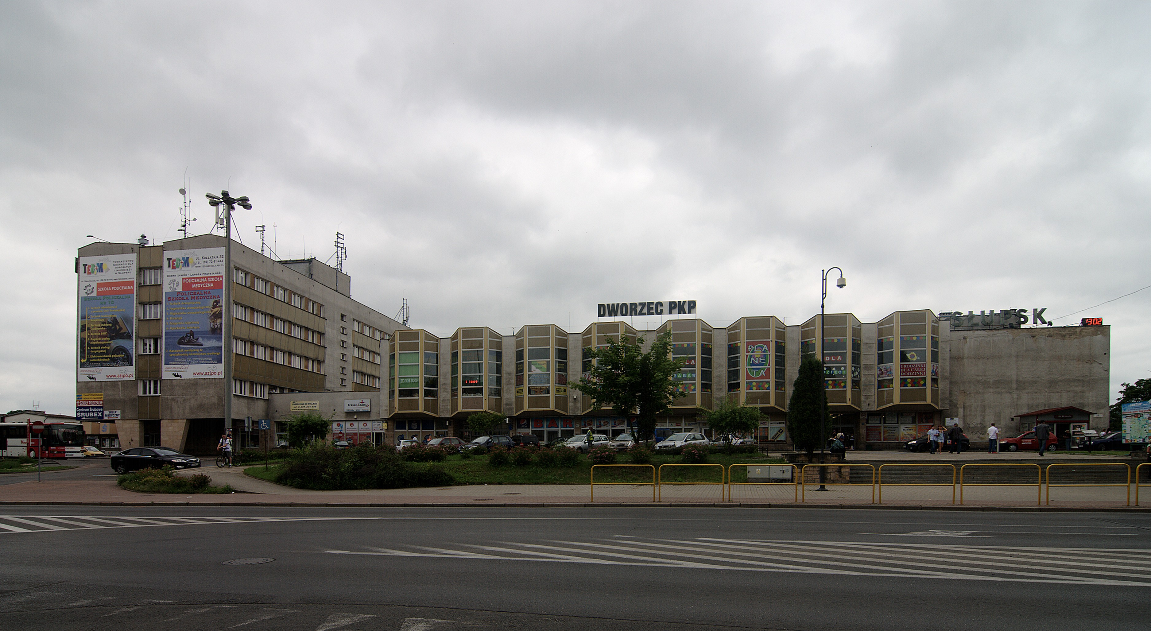 Słupsk. Dworzec kolejowy.